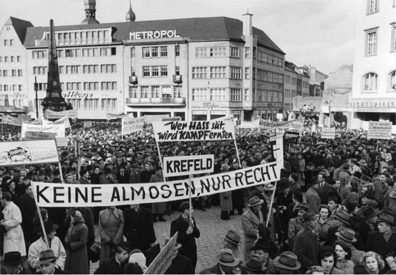 Flüchtlingsdemonstration, Marktplatz 1951